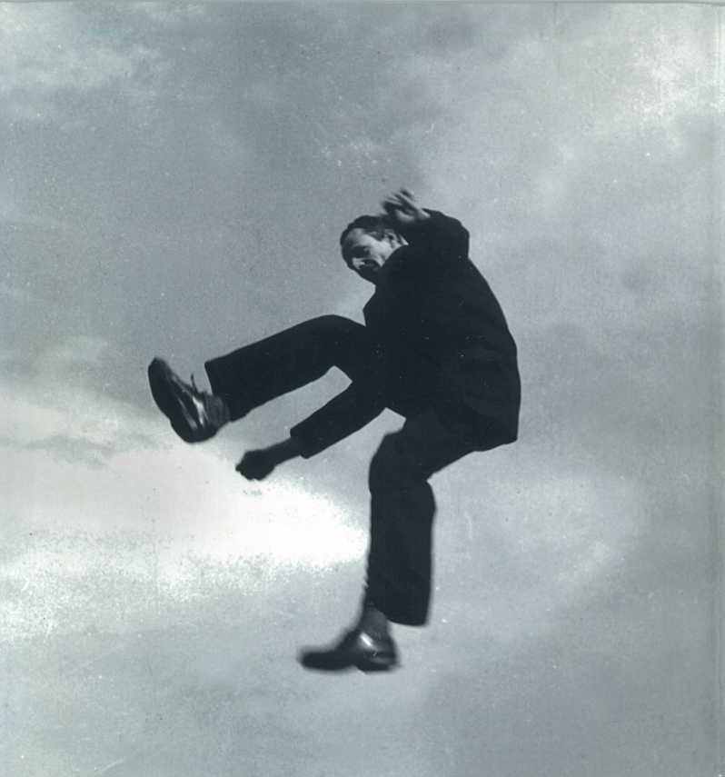 Obálka knihy Vladimír Boudník – mezi avantgardou a undergroundem, Zdenek Primus